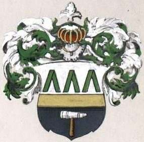 Demidovi suguvõsa aadlivapp